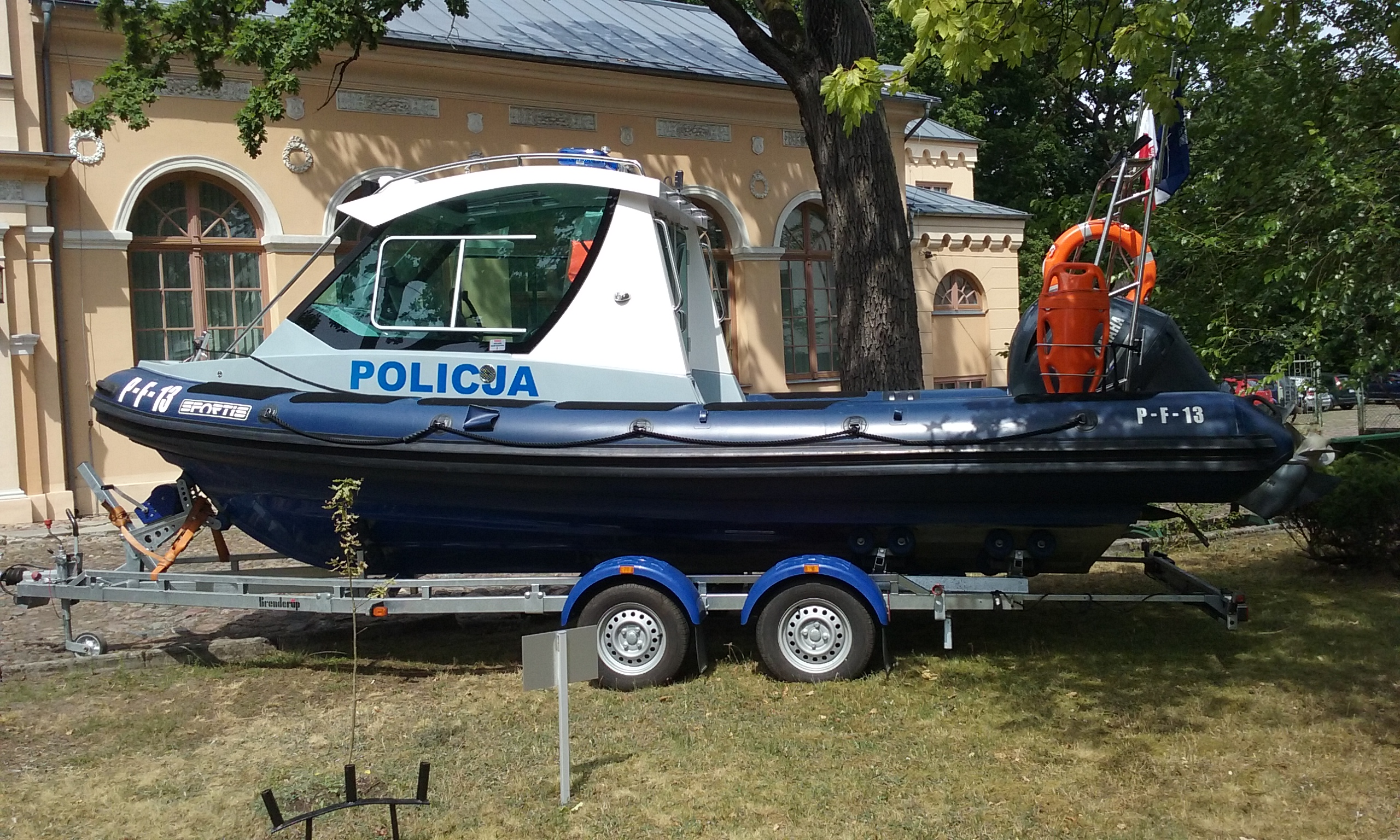 Motorowka tomaszowskiej Policji. Tomaszów Mazowiecki w województwie łódzkim, PL, EU. CC0